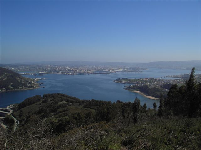 Panorámica de Mugardos e Ferrol. Ría de Ferrol, Galicia, Spain.